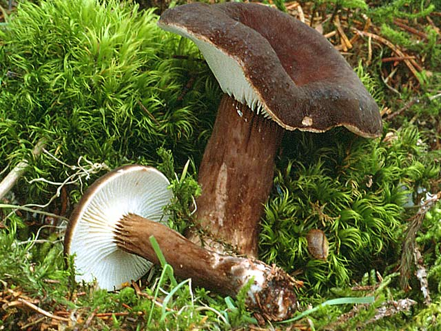 Lactarius lignyotus